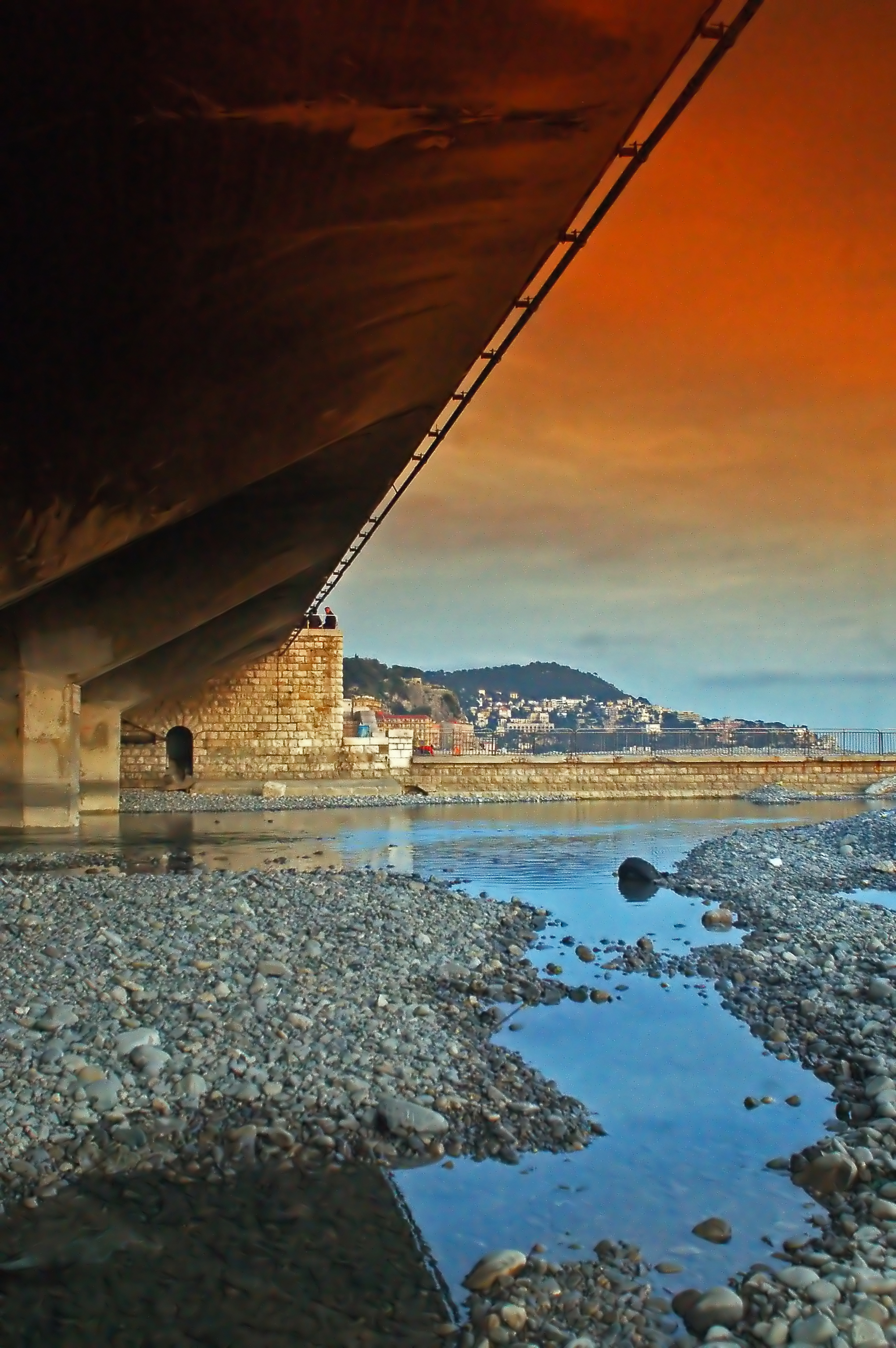 Le torrent Paillon sous sa couverture lorsqu'il se jette dans la baie des anges de Nice.